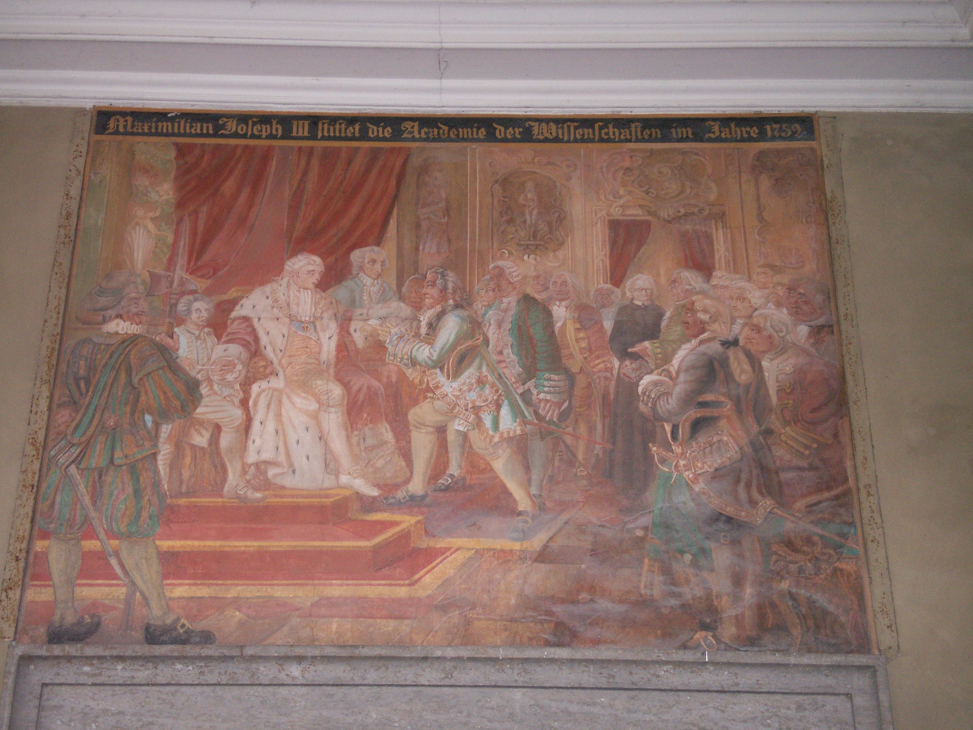 Wandgemälde im Münchener Hofgarten mit Szenen aus der bayerischen Geschichte. „Maximilian Joseph III. stiftet die Akademie der Wissenschaften (1759)“ von Philipp Foltz.